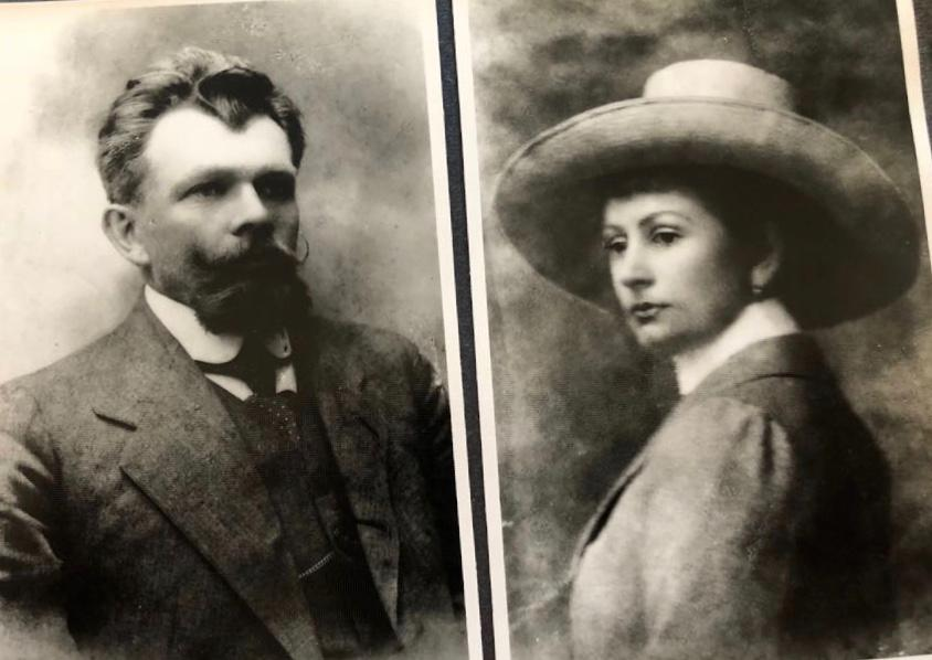 Adolf Aleksander Smoleński i jego żona - Maria Smoleńska z domu Bukowiecka